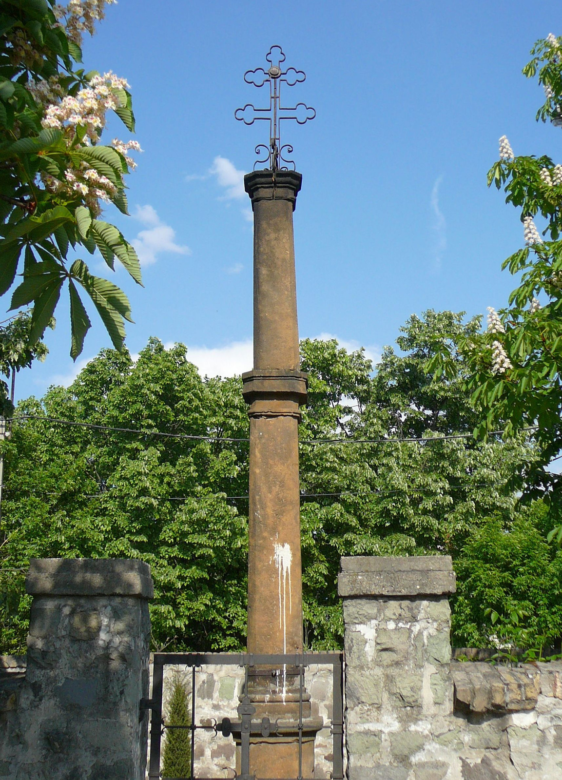 Görögkeleti kálvária (Szentendre, Szerb kálvária tér) This is a photo of a monument in Hungary, Identifier: 7398